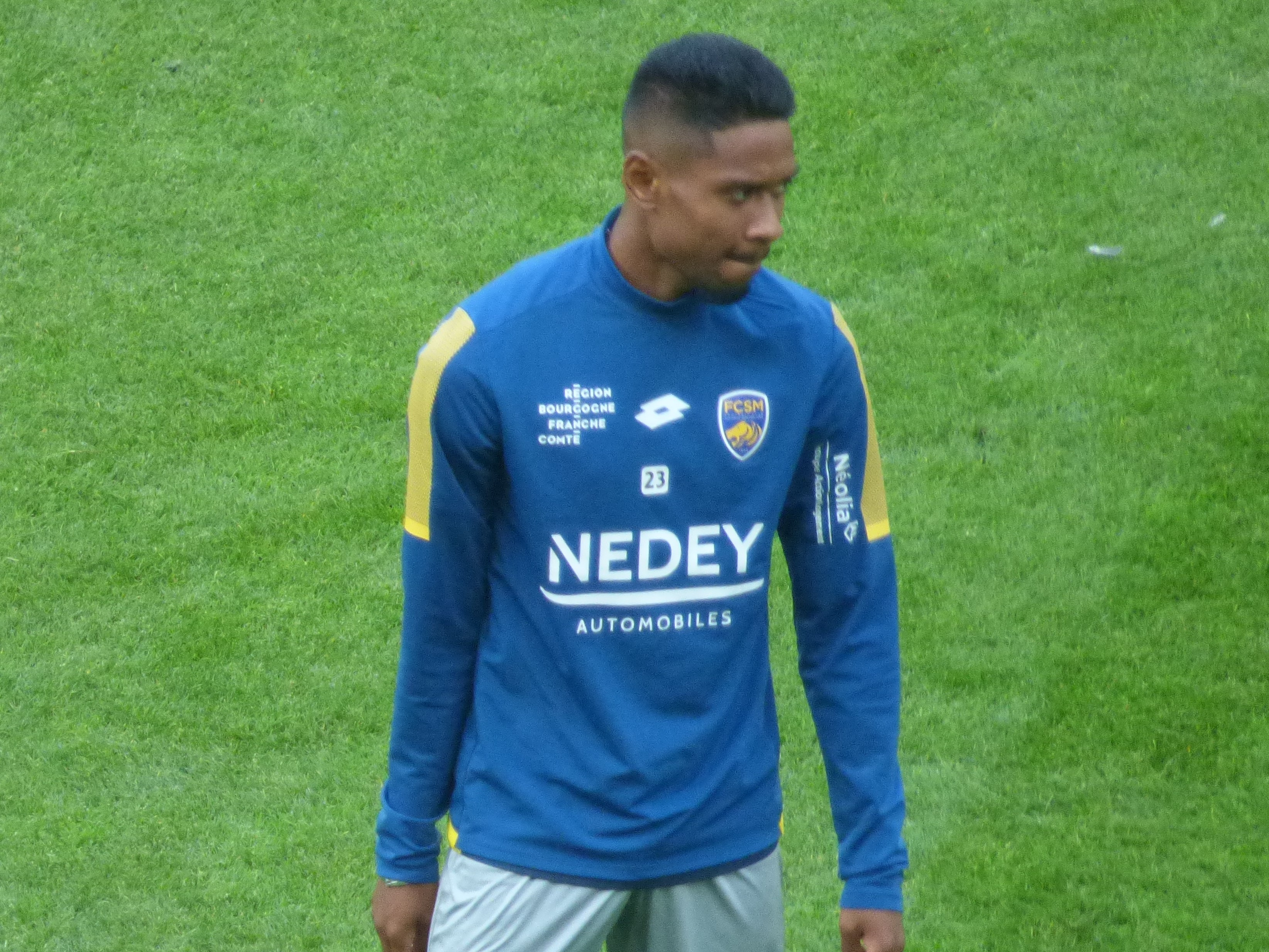 Jason Pendant avant le match Lens / Sochaux, comptant pour la septième journée du championnat de France de football de Ligue 2, le 15 septembre 2018.